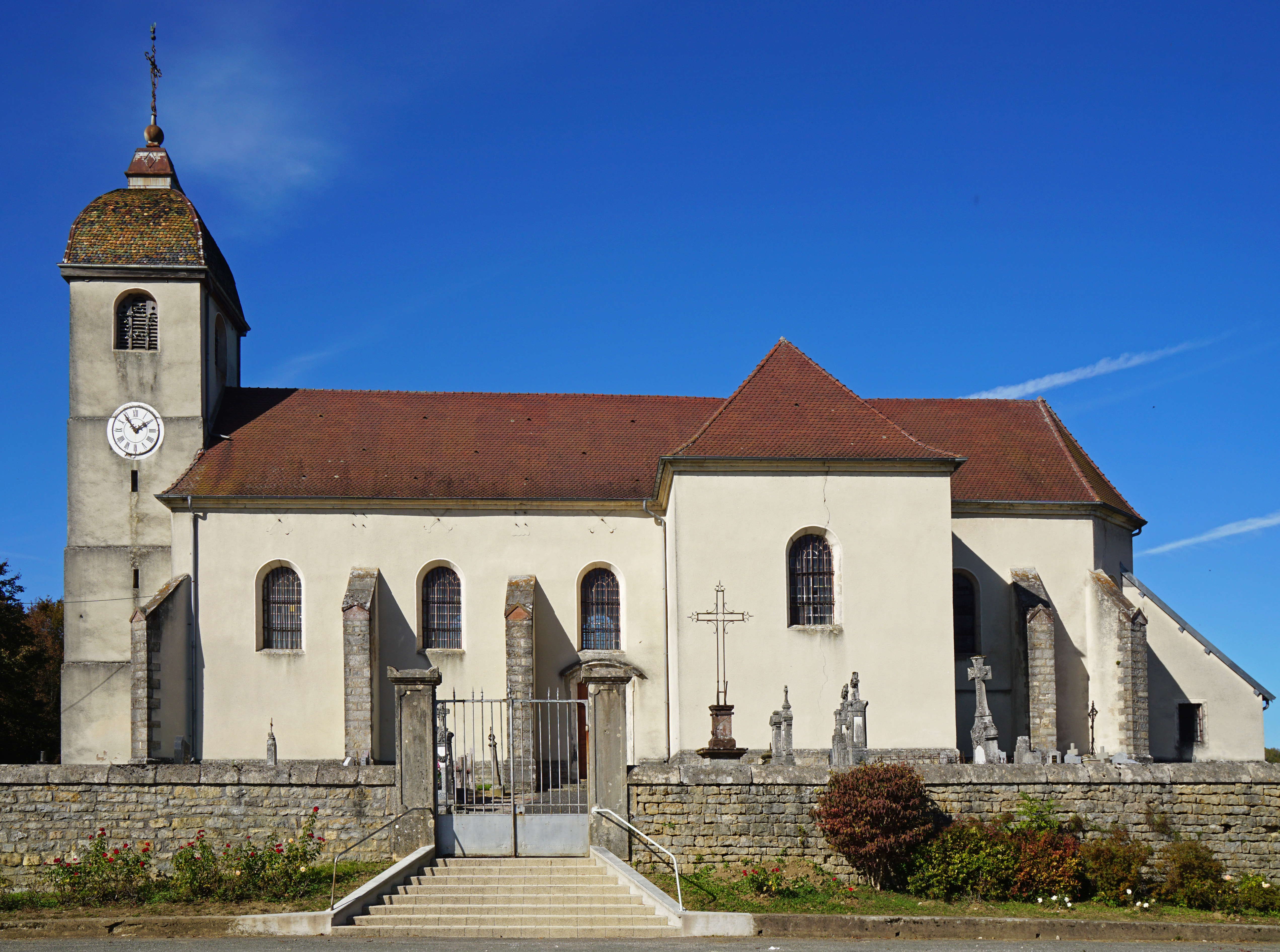 L'église d'Abbenans.